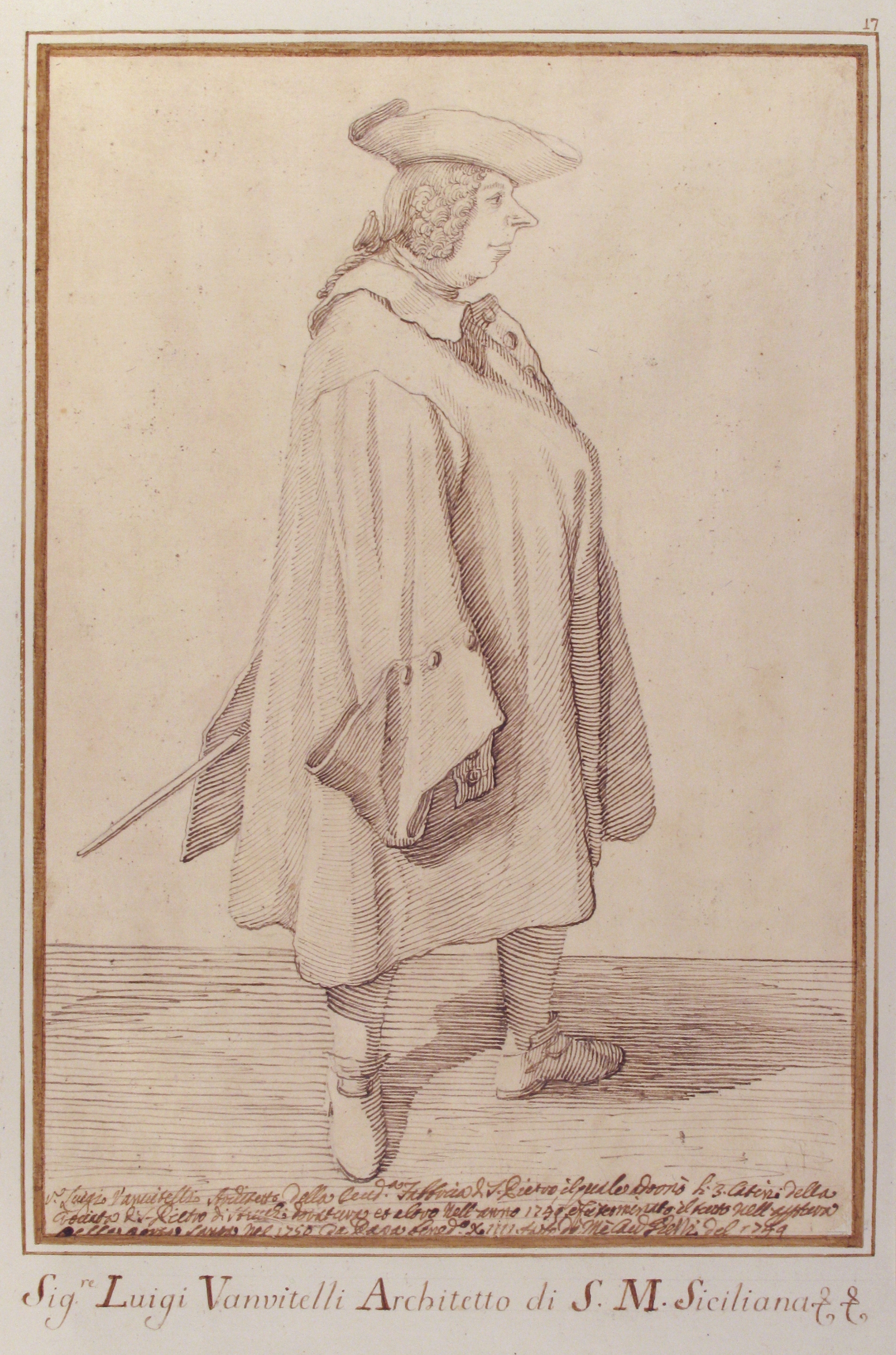 Drawing; Drawings